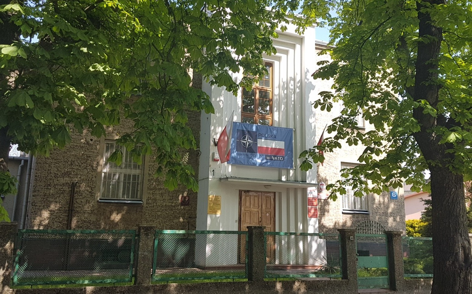 WKU Ciechanów (01.05.2019)